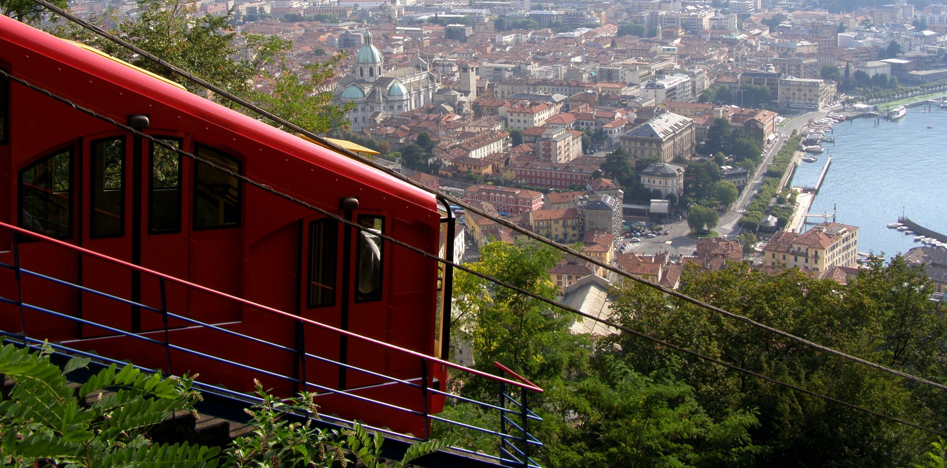 La funicolare di Como. Unknown